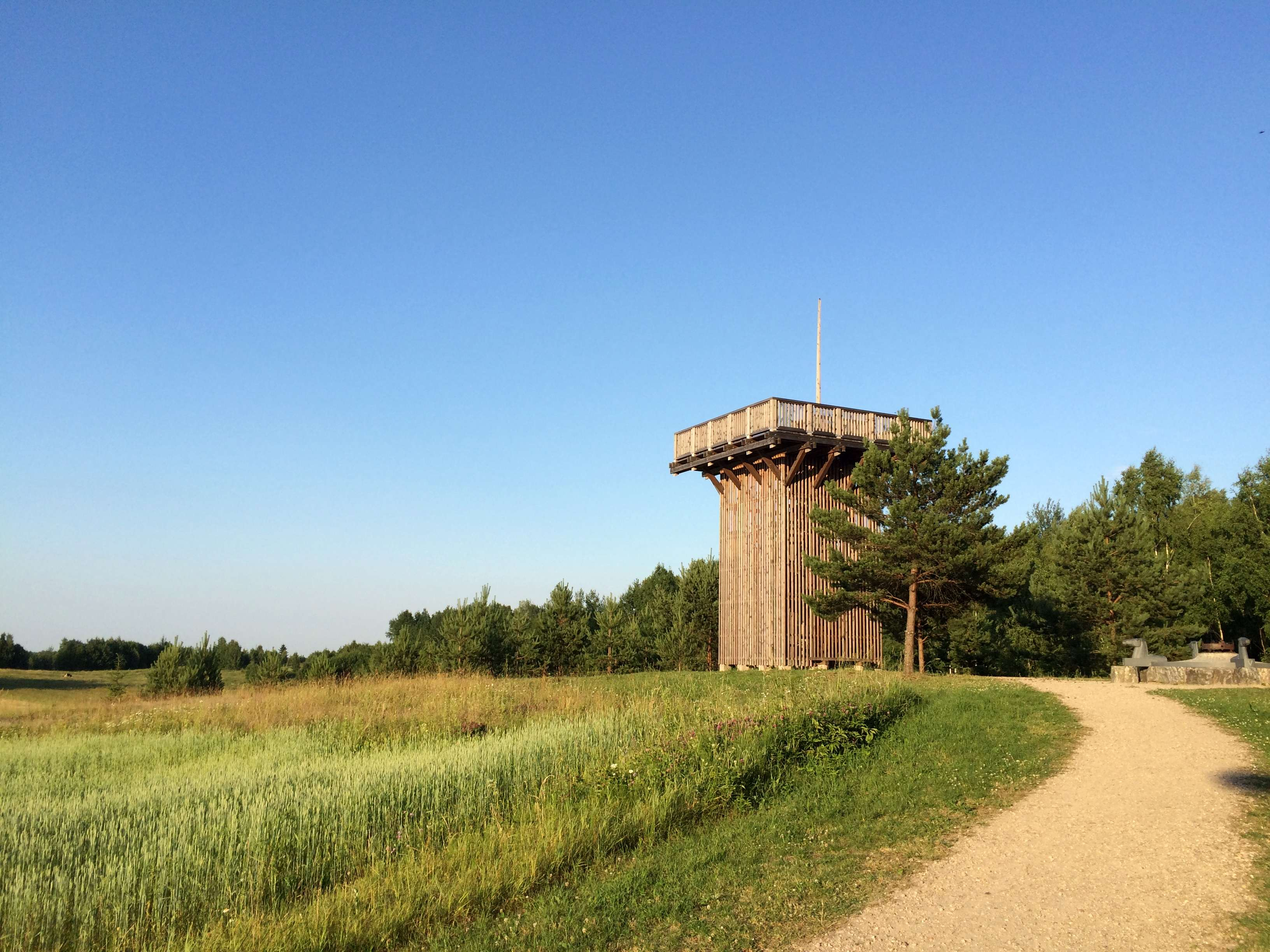 Aukštojo kalnas